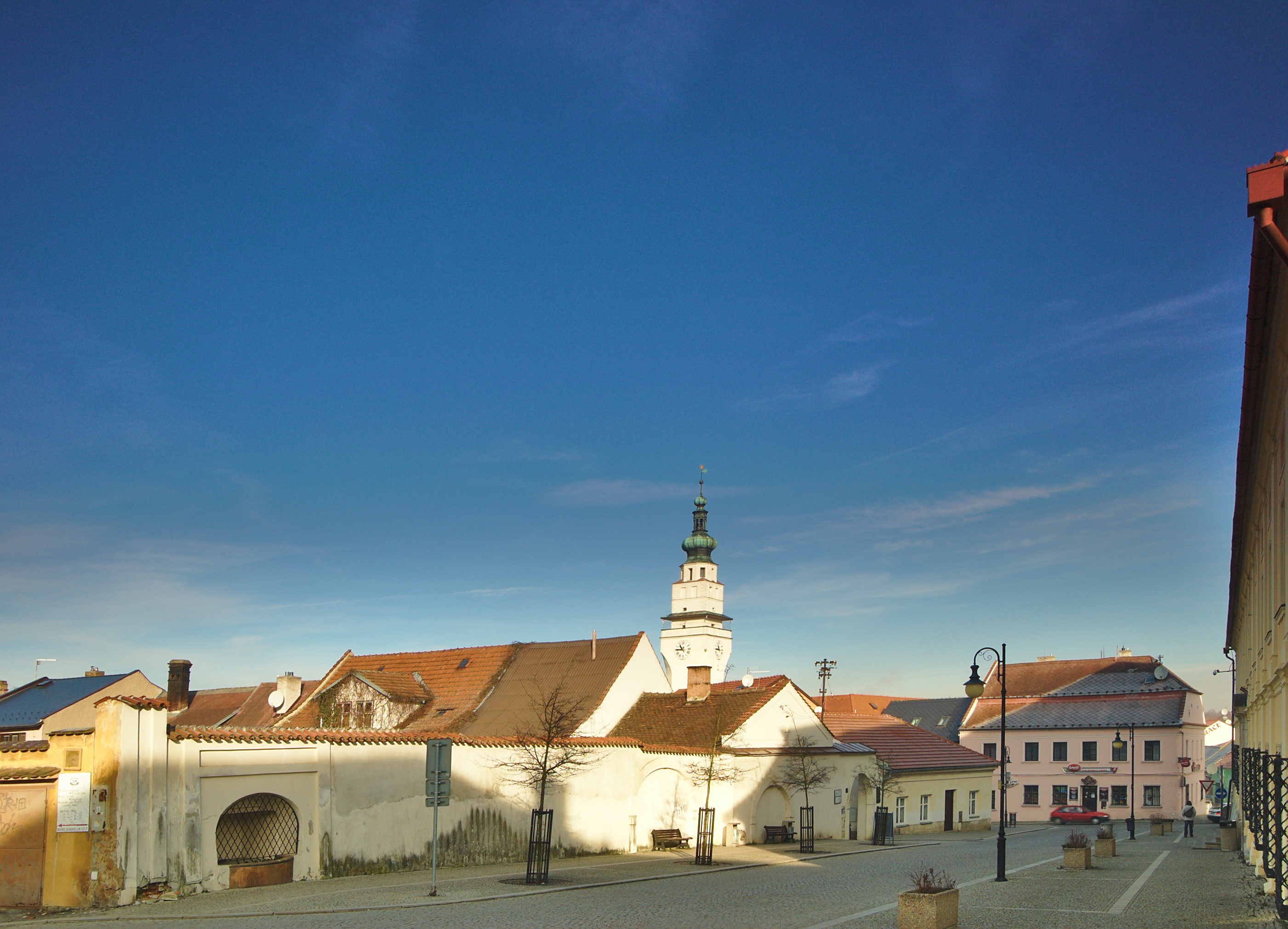 Pohled na radnici z ulice Hradní, Boskovice, okres Blansko